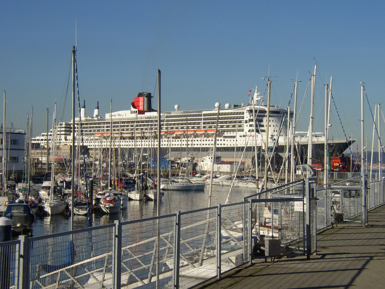 El trasatlántico Queen Mary 2 desde el puerto deportivo de Vigo.